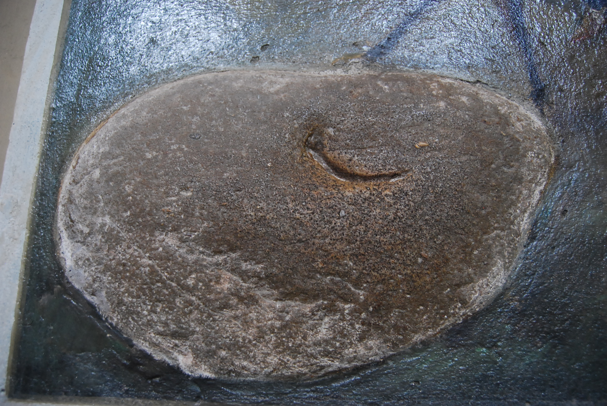 A máriaradnai templom déli falán látható kő, melyben a legenda szerint török lovas patkónyoma van